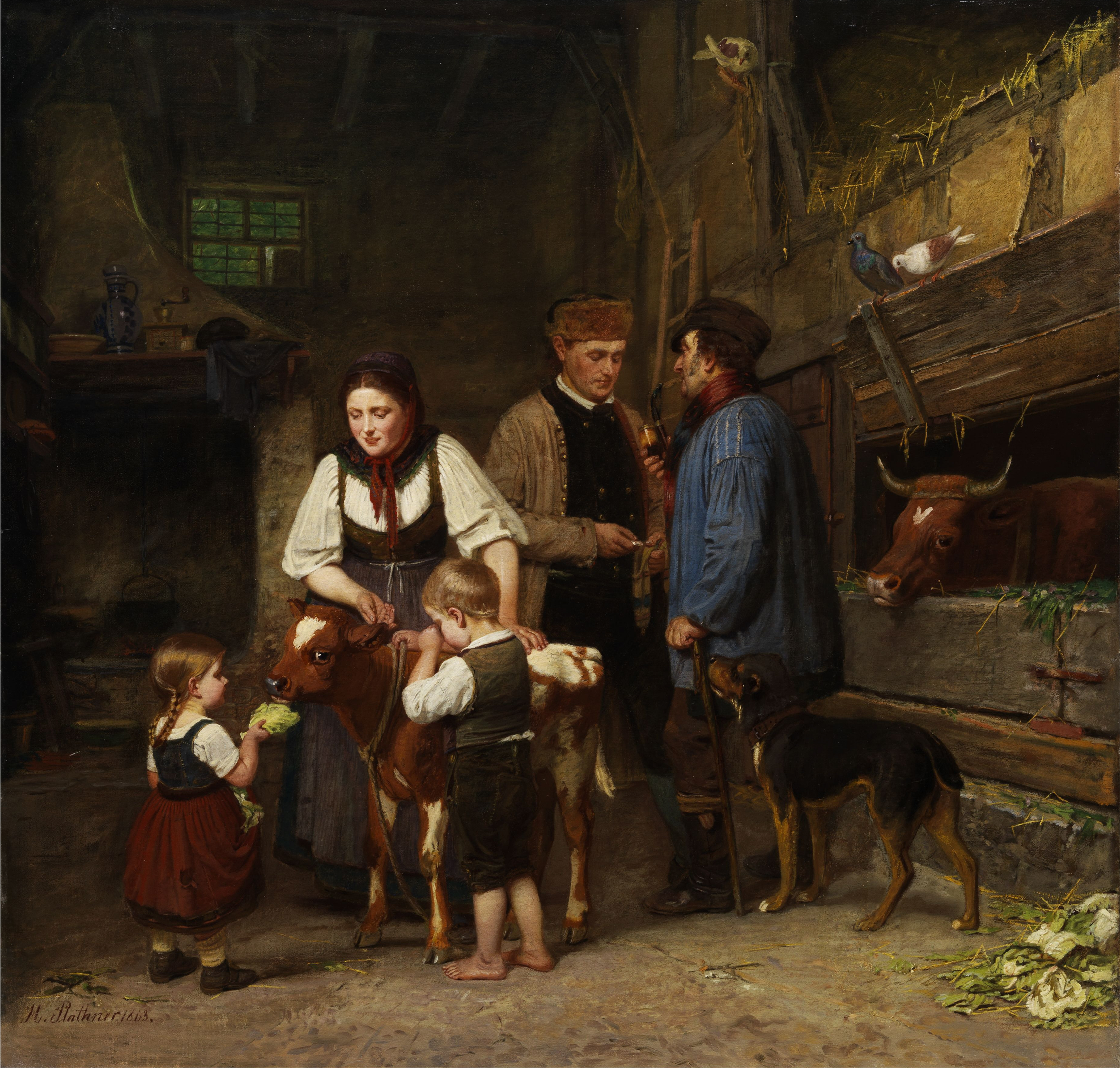 Das verkaufte Kalb. Öl auf Leinwand. 68,5 x 71 cm. Links unten signiert.